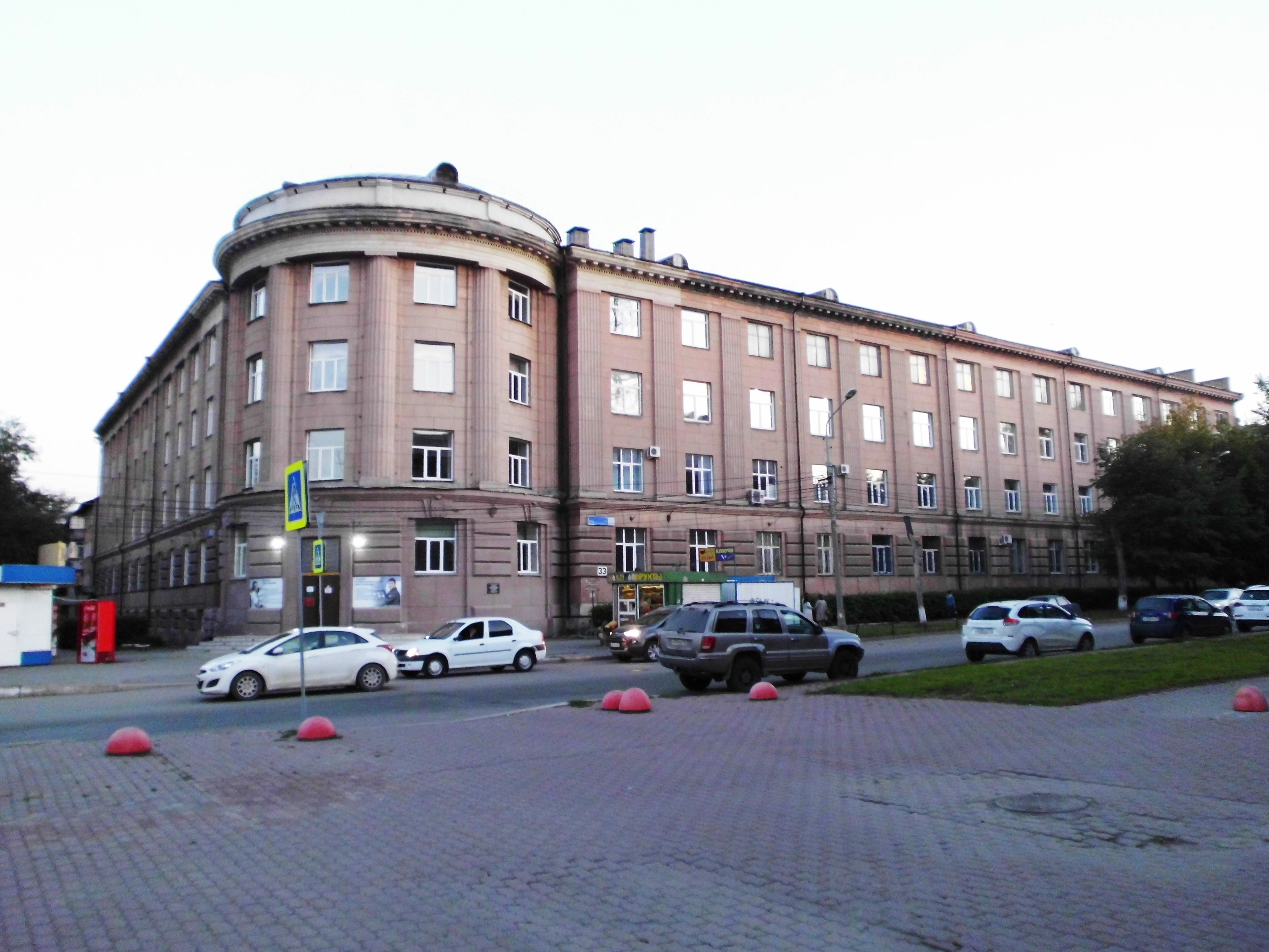 Техникум железнодорожный: улицы Цвиллинга, 56 / Орджоникидзе, 33, Челябинск, Челябинская область. Один из корпусов Челябинского института путей сообщения - филиала Уральского государственного университета путей сообщения (ЧИПС - УрГУПС).